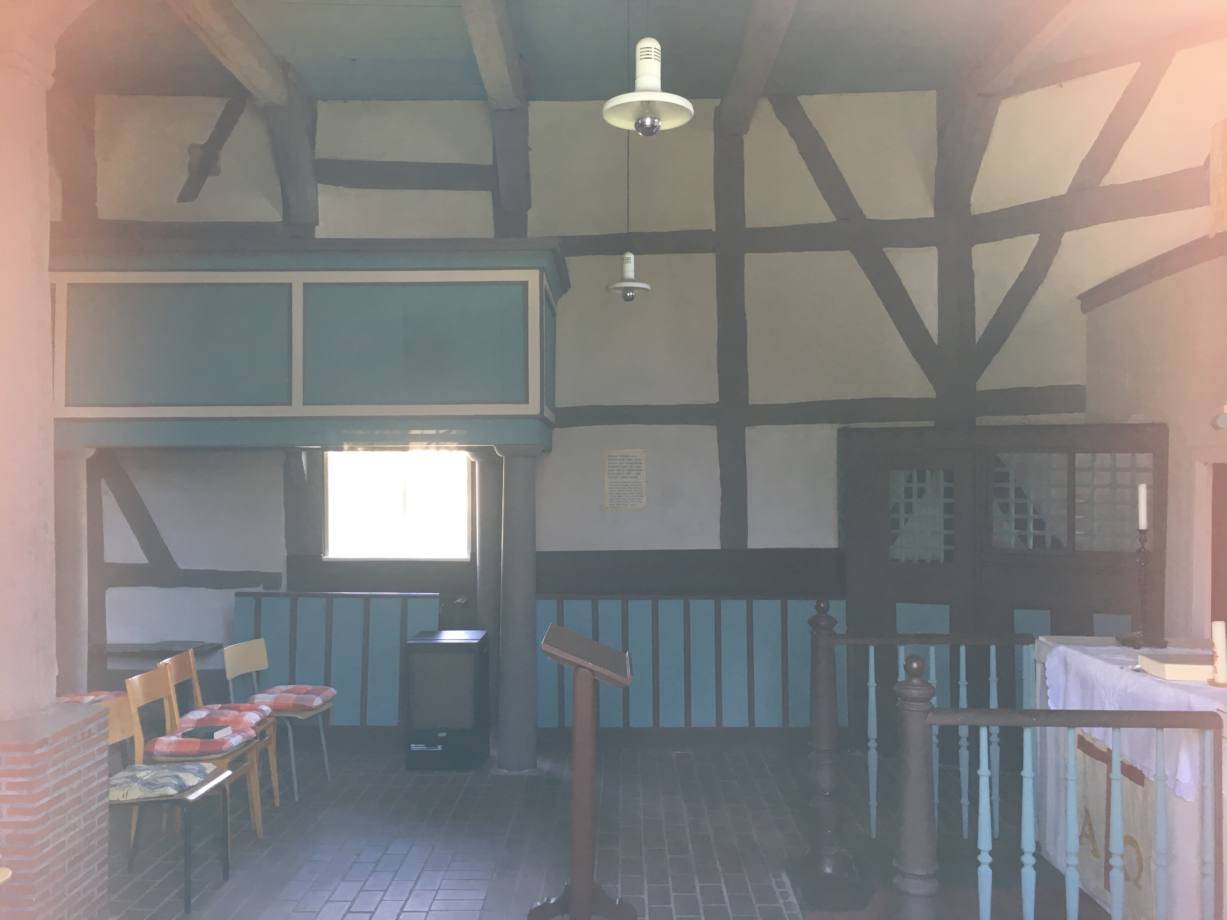 Die Fachwerkkirche in Dümde (Nuthe-Urstromtal) wurde im Jahr 1793 errichtet und 1881 um einen Kirchturm ergänzt. Die Ausstattung stammt aus der Bauzeit.